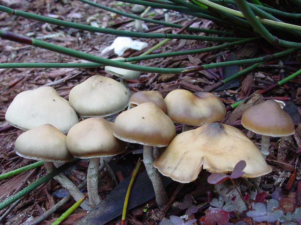 Psilocybe subaeruginascens in San Francisco, CA